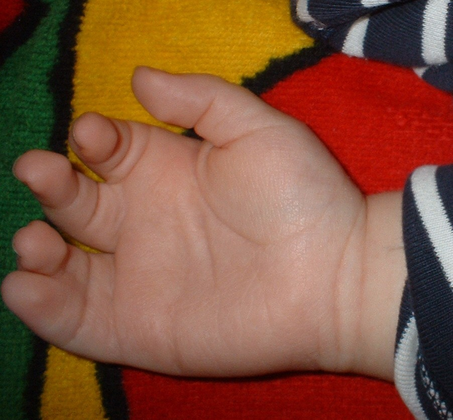 Syndaktilie zwischen dem vierten und fünften Finger der rechten Hand.